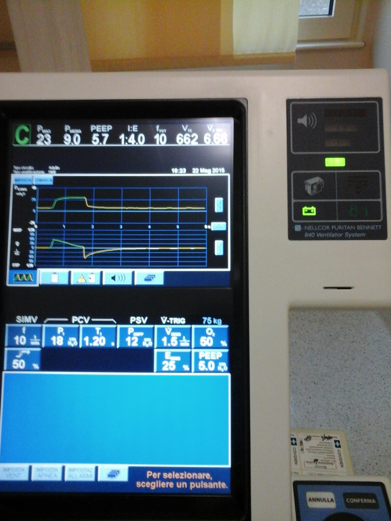 صفحه نمایش یک ونتیلاتور ۸۴۰ ساخت پوریتان بنت